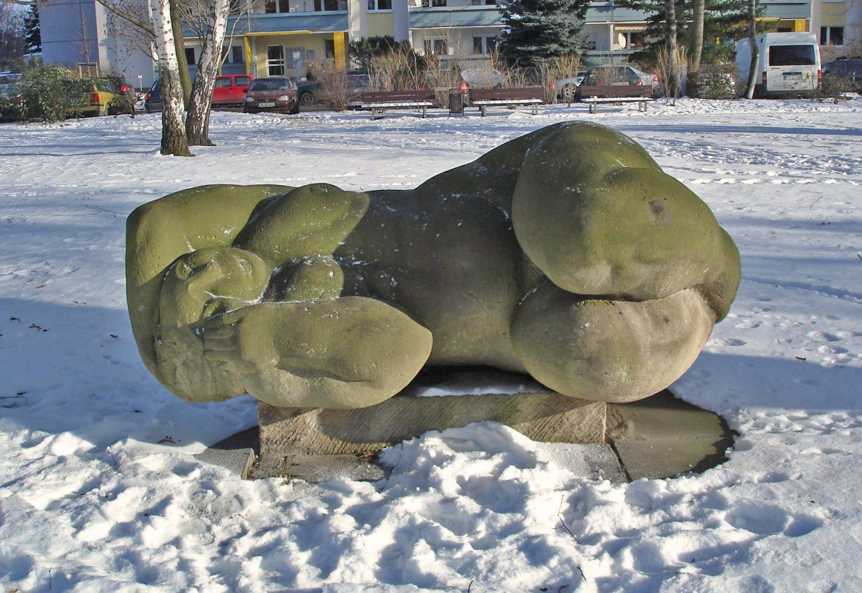 Peter Makolies - Die Große Liegende. Sachsenplatz, Dresden